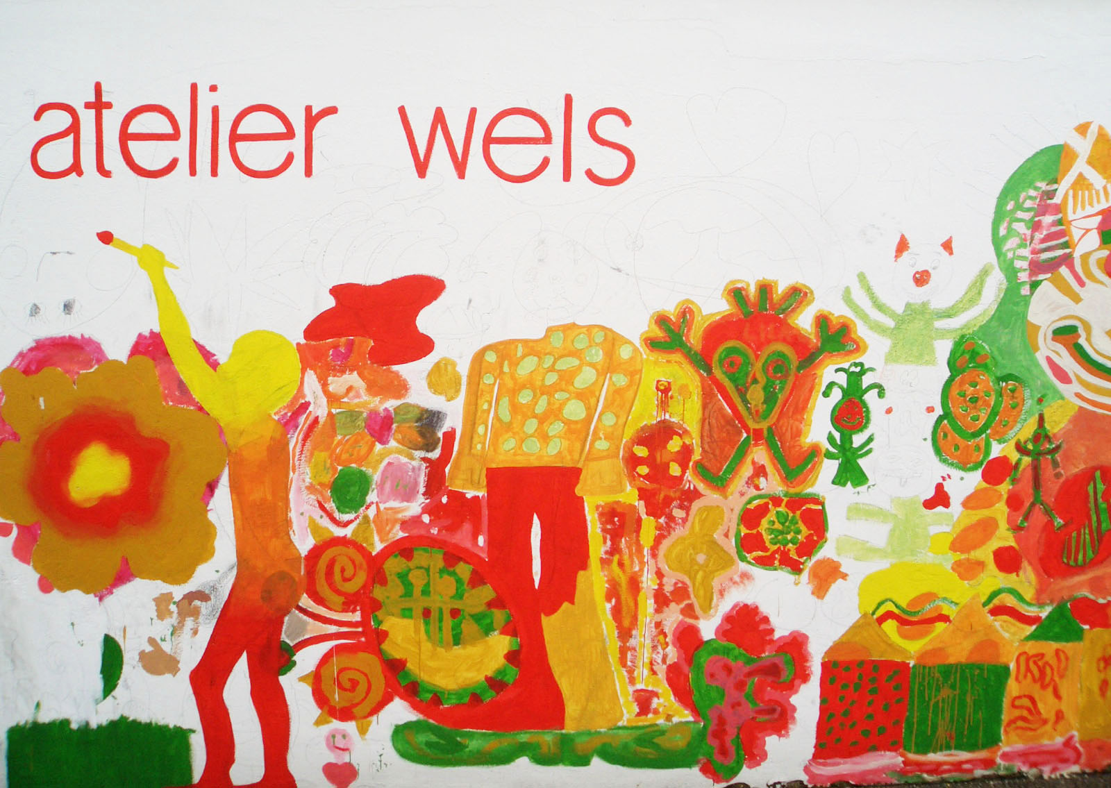 Wandbild beim Atelier Wels in der Rahmenfabrik Nöfa